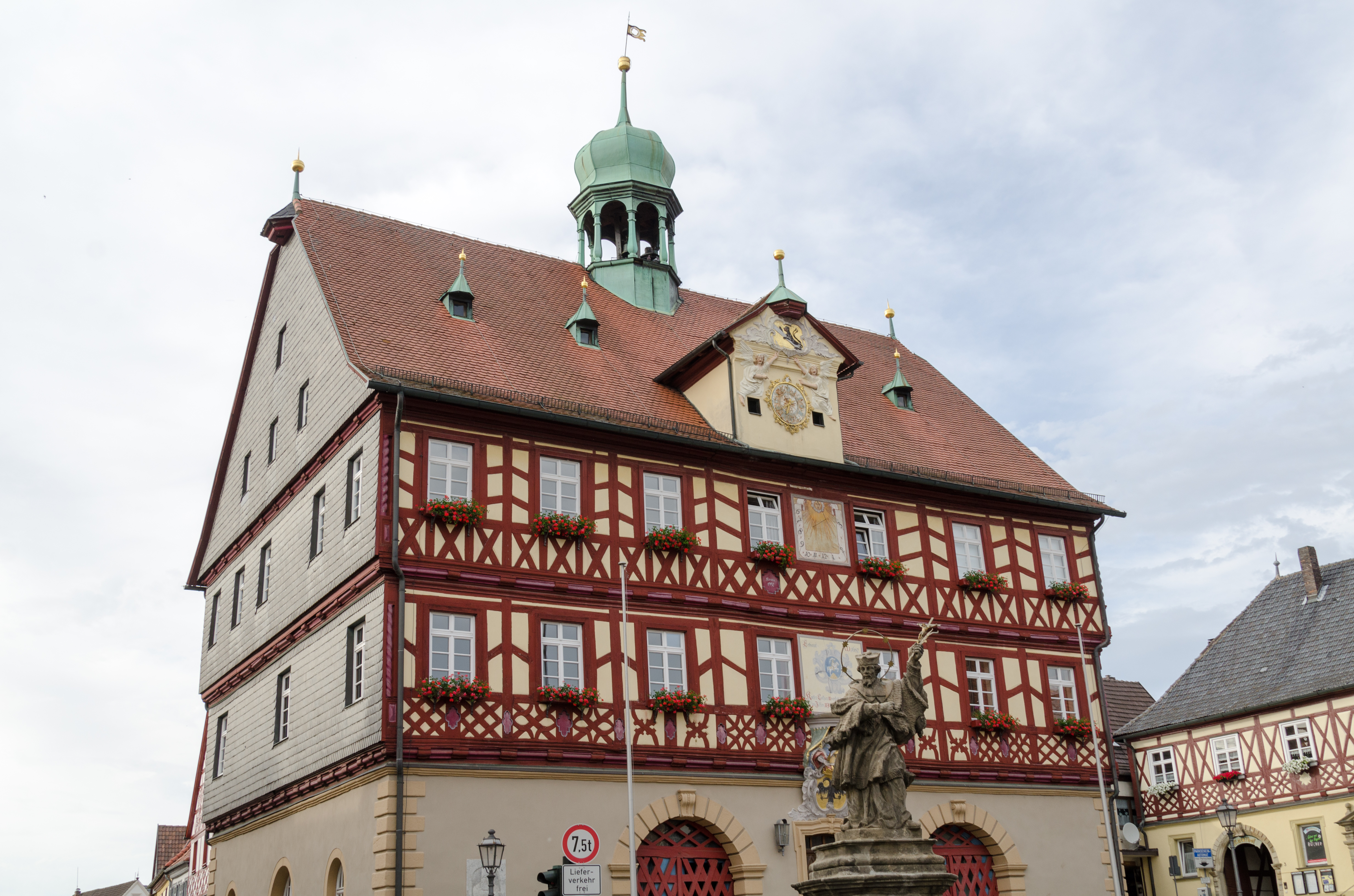 Bad Staffelstein, Marktplatz 1